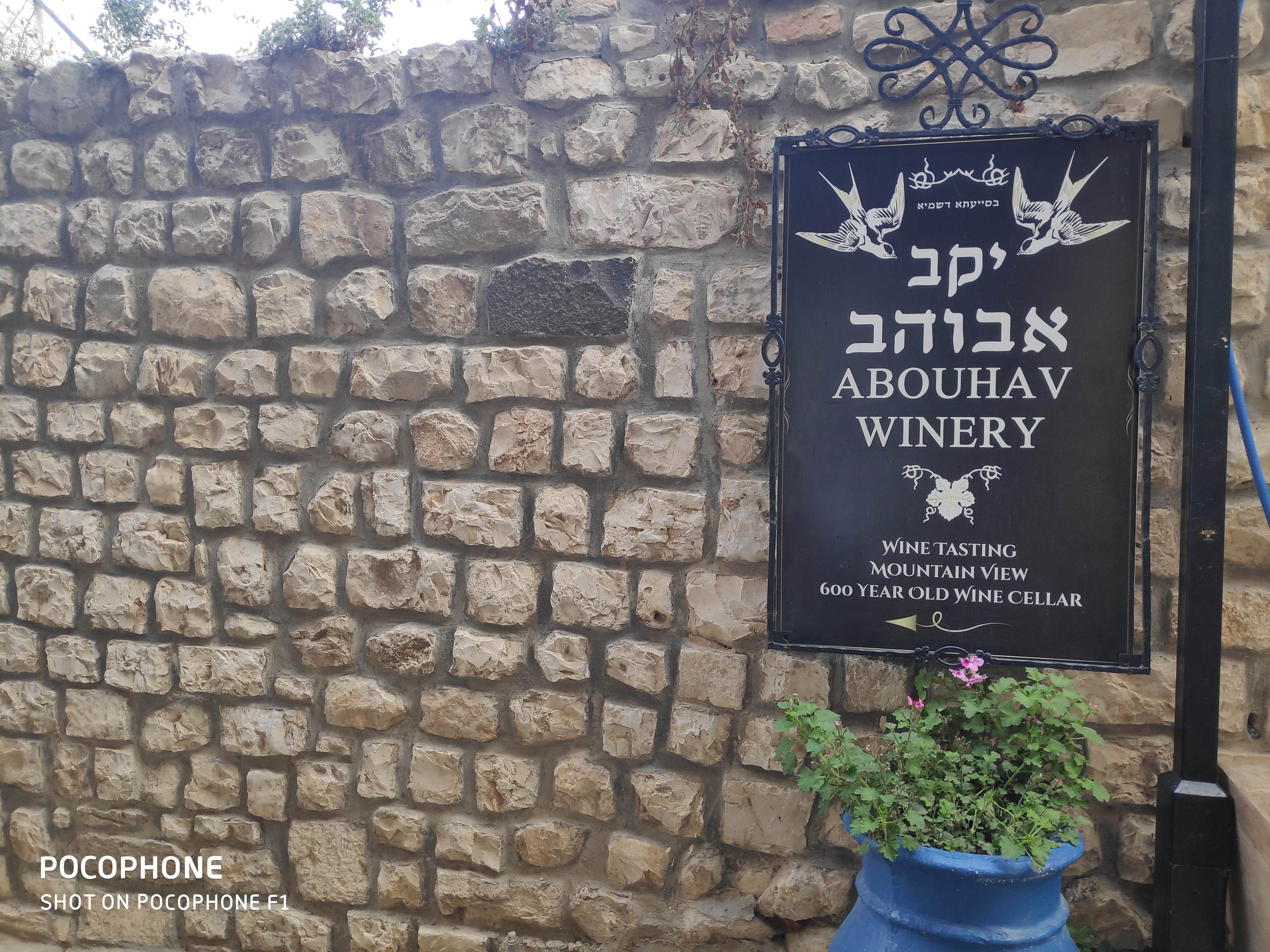 יקב אבוהב צפת